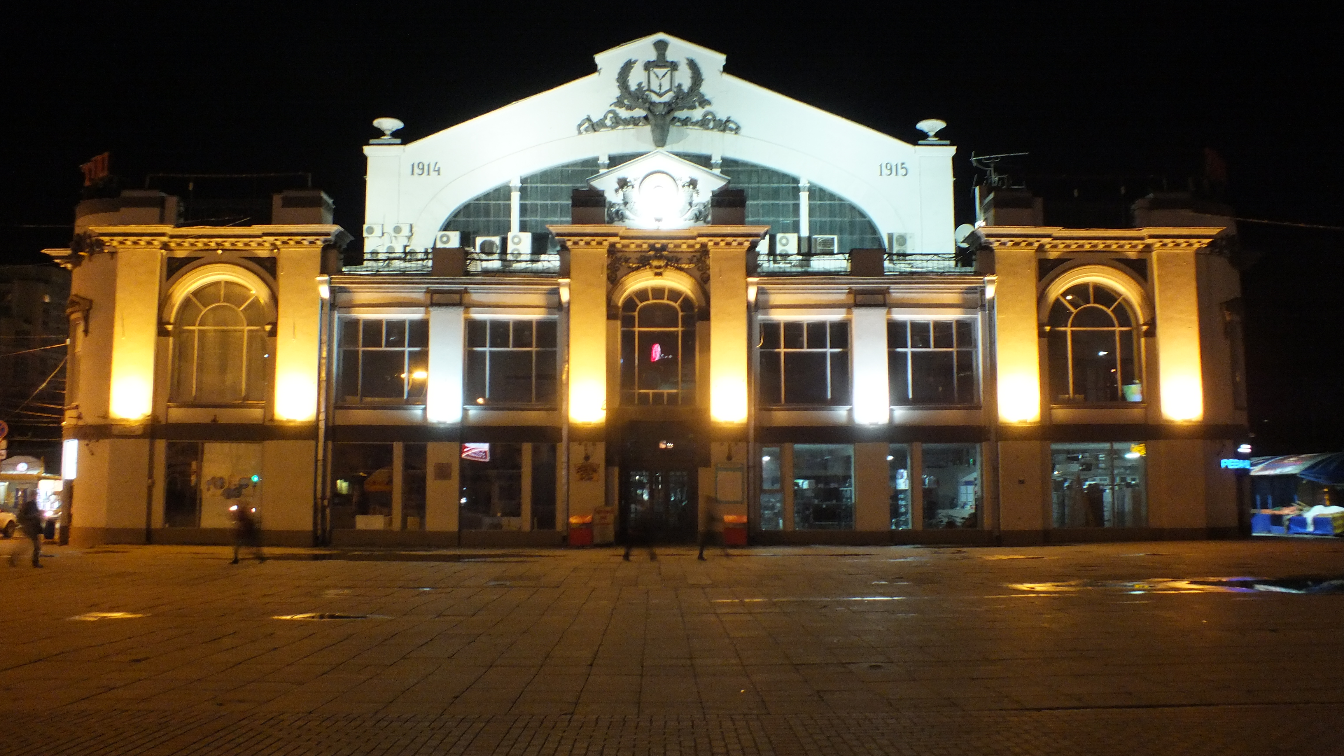 Рынок городской крытый (здание крытого рынка): улица Чапаева, 59, Кирова площадь, Саратов, Саратовская область